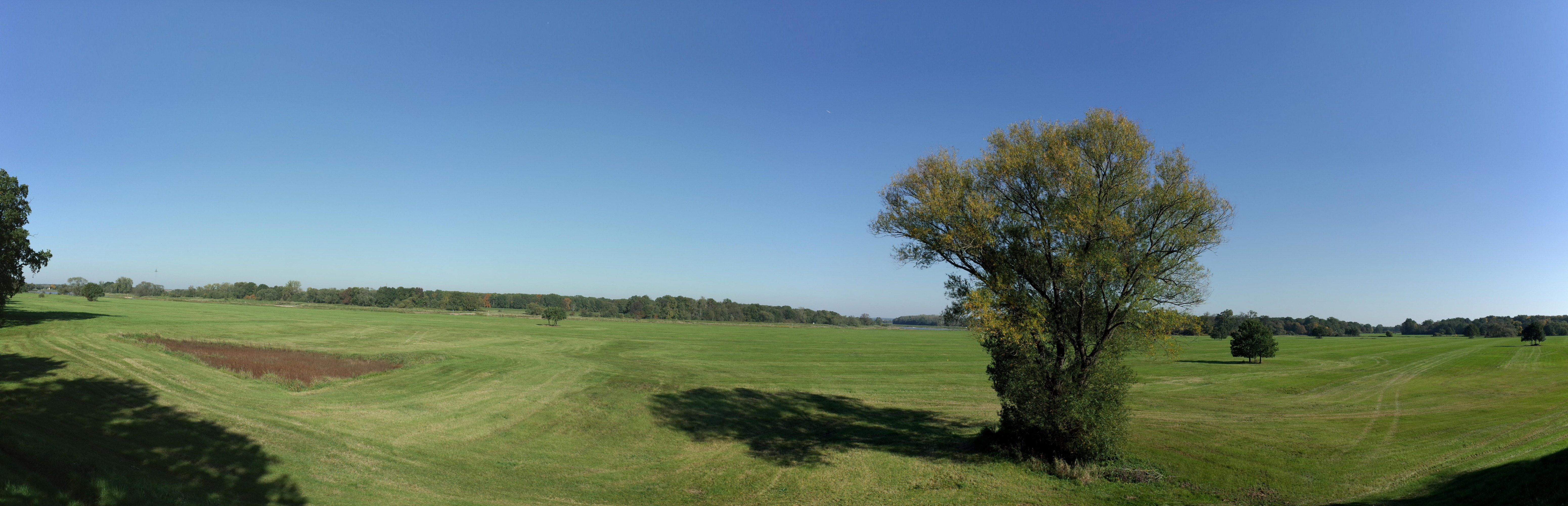 Oranienbaum-Wörlitz, Ortsteil Vockerode, Wiesenmarke (Baudenkmal im Denkmalverzeichniss Sachsen-Anhalt, Erfassungsnummer: 094 40624 000 000 000 000 [1])